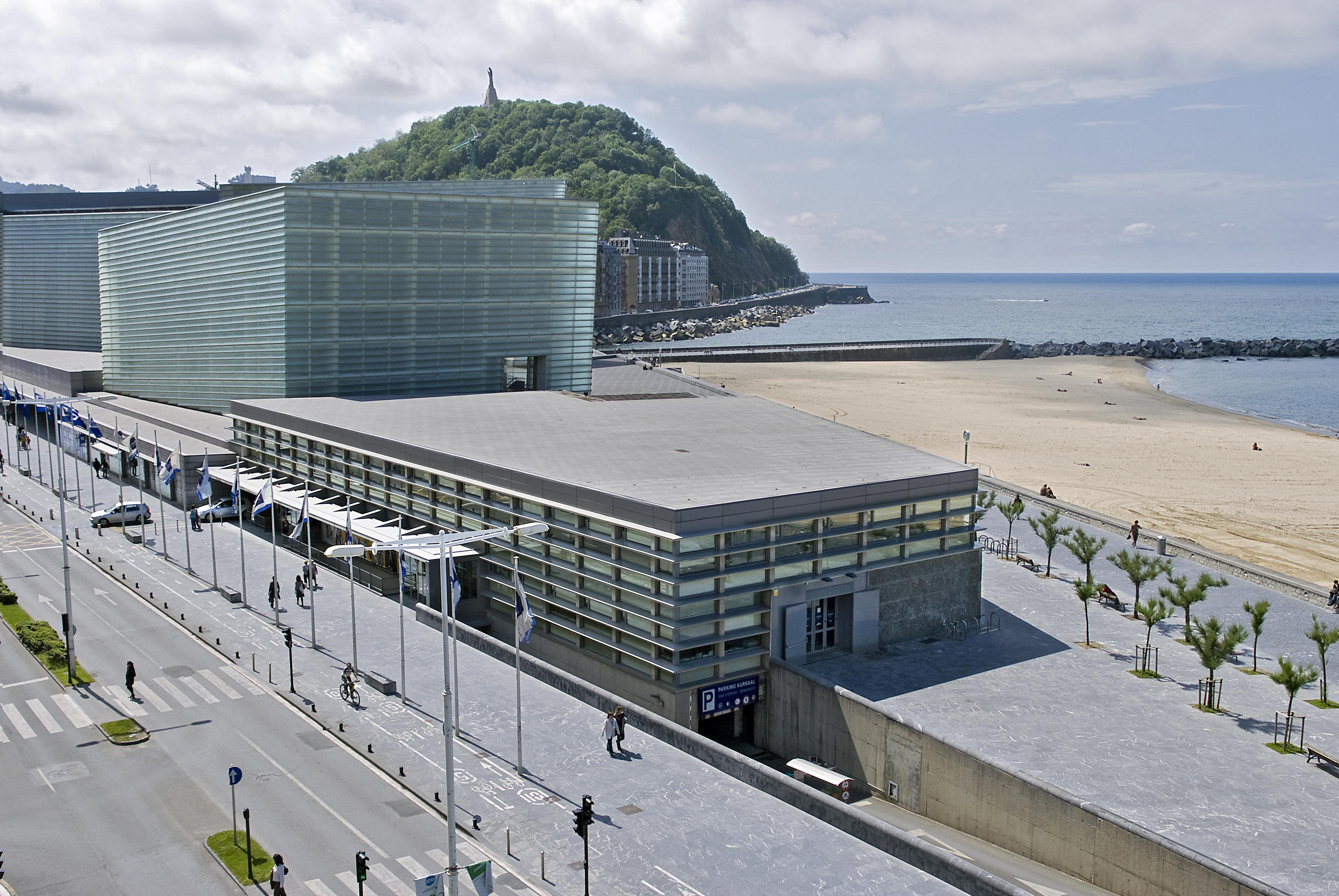 Vista exterior de la sala de exposiciones